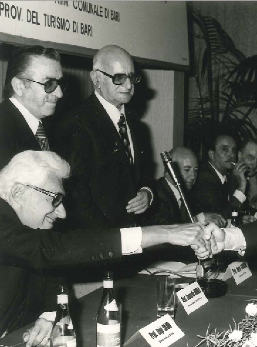 Il critico letterario Mario Sansone (in piedi, davanti al microfono) e lo scrittore Luigi Silori (in primo piano) durante la premiazione del Premio di poesia Bari Palese (14 ottobre 1979)